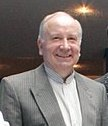 Павел Яковлевич Слободкин является основателем и бессменным руководителем ВИА «Весёлые ребята»